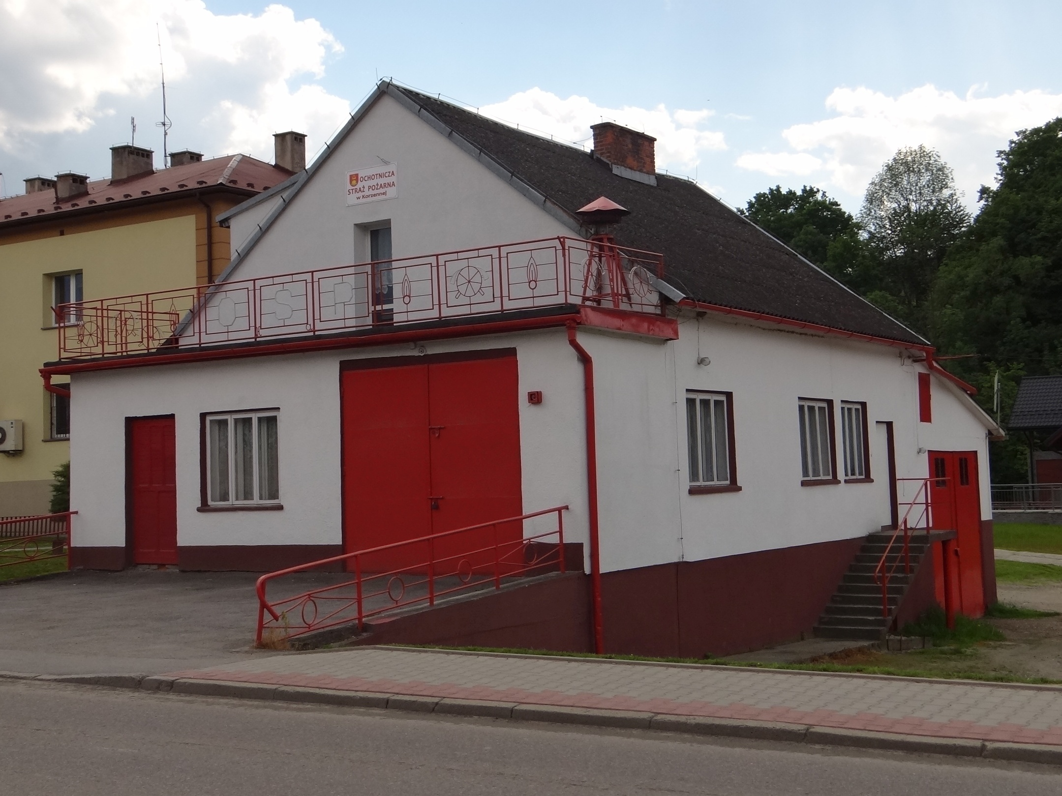 OSP w Korzennej